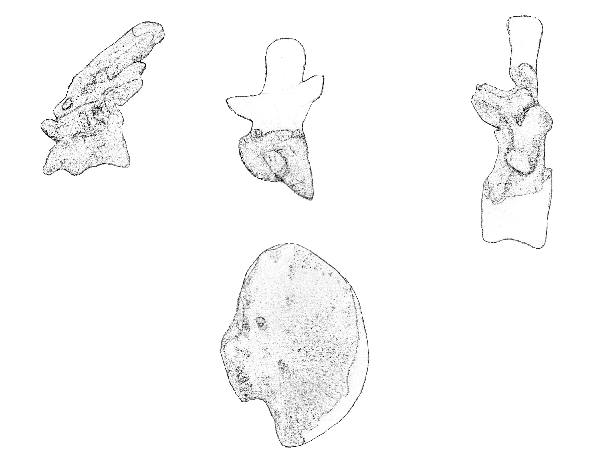 Ilustración de los restos recuperados de Epanterias